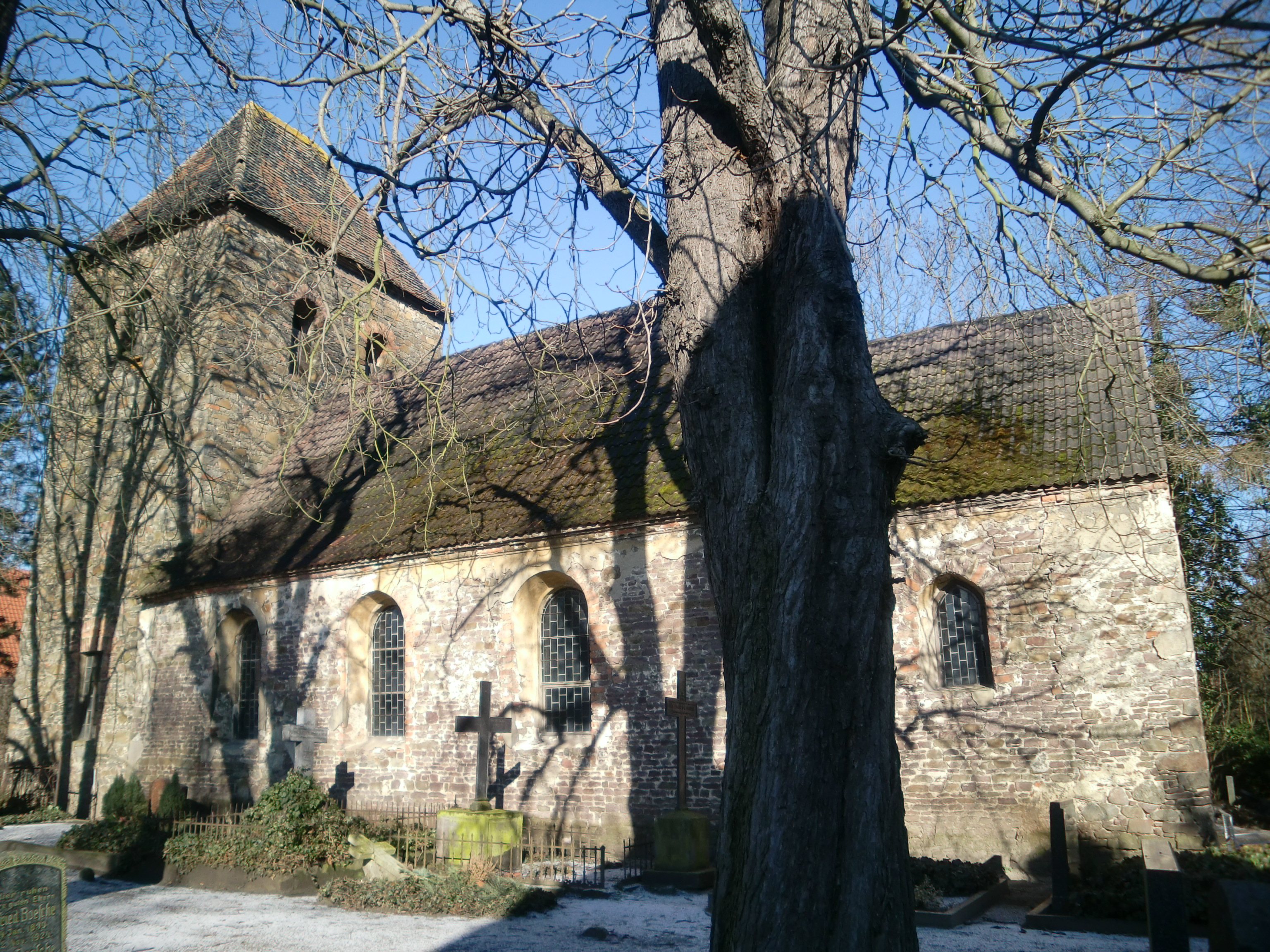 Dorfkirche Elbeu - Wirkungsstätte ab 1842. Dorfkirche Elbeu.